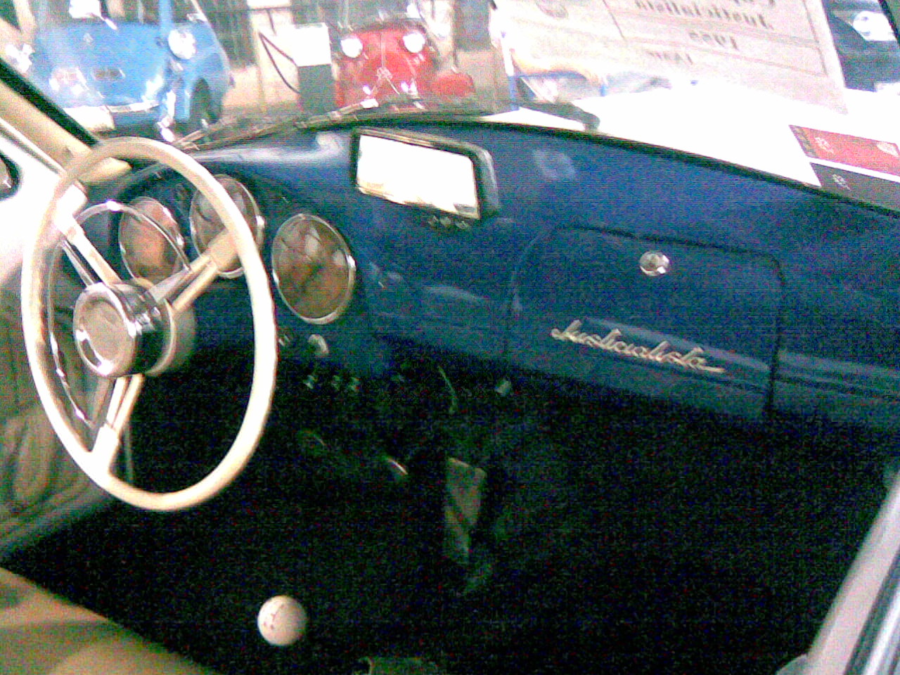 Auto justicialista 03 - interior